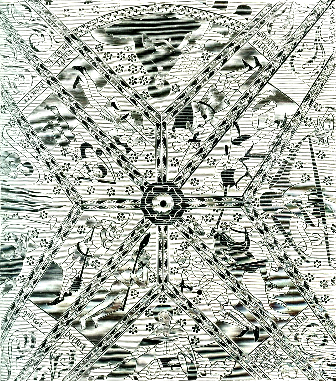 Didrikssagan, an old germanic saga.